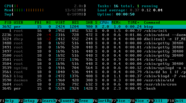 htop running in ubuntu jeos